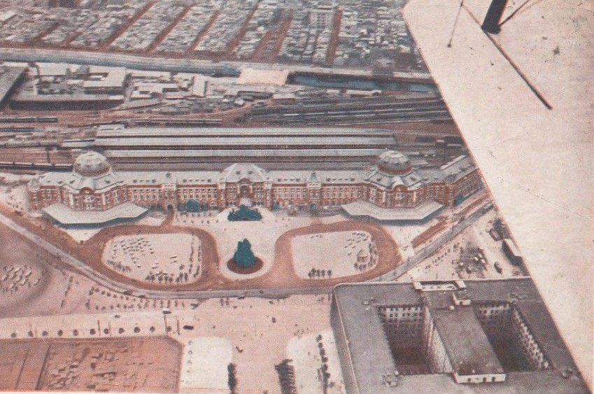 東京駅 航空写真